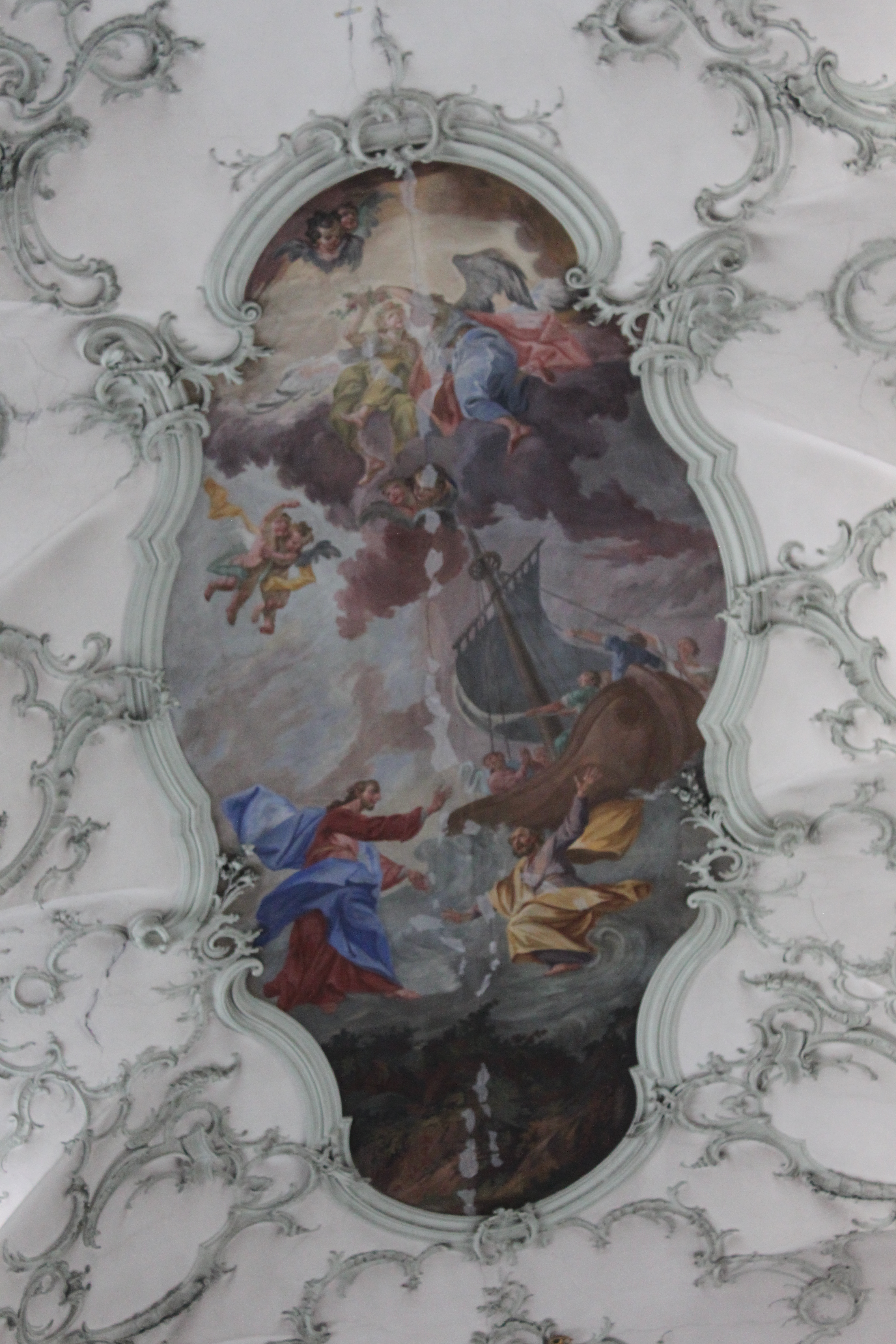 Gesamtanlage Erzabtei St. Peter, Lodronsche Stadtbefestigungund und archäologische Fundhoffnungsgebiete, Stiftskirche St. Peter Salzburg Gewölbebild